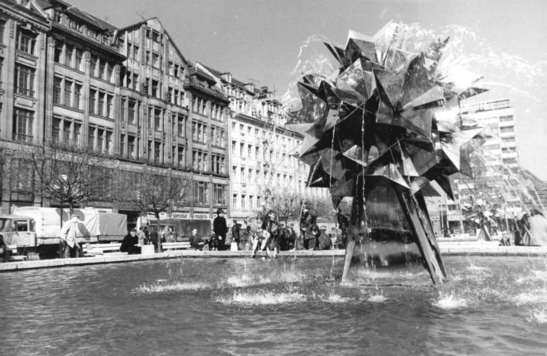 Leipzig, Sachsenplatz, Springbrunnen ADN-ZB Gahlbeck 16-4-1979 Leipzig: Blick auf den Sachsenplatz.